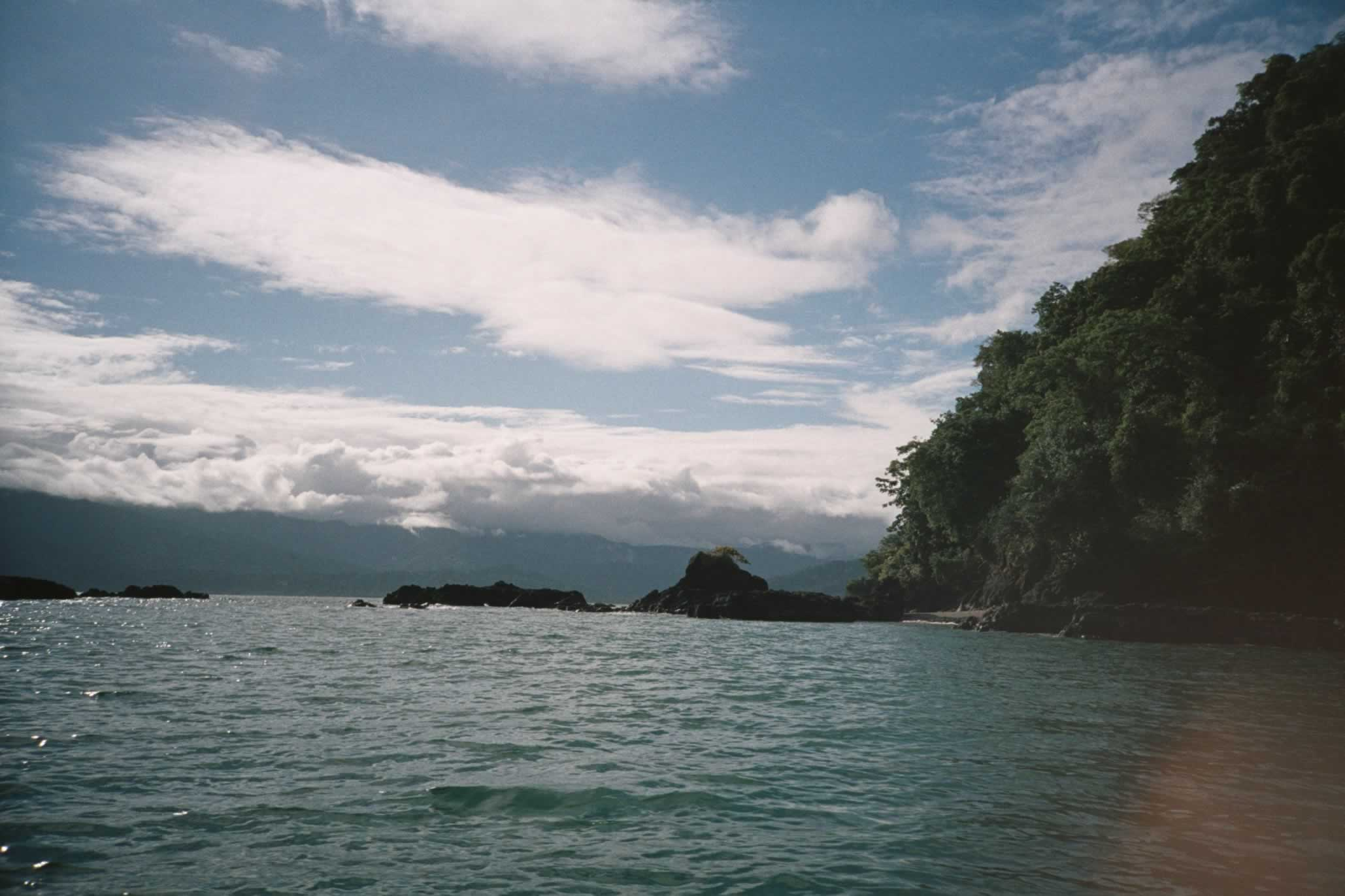 Pacífico colombiano